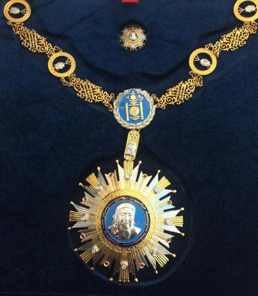 Монгол: Чингис хааны одон